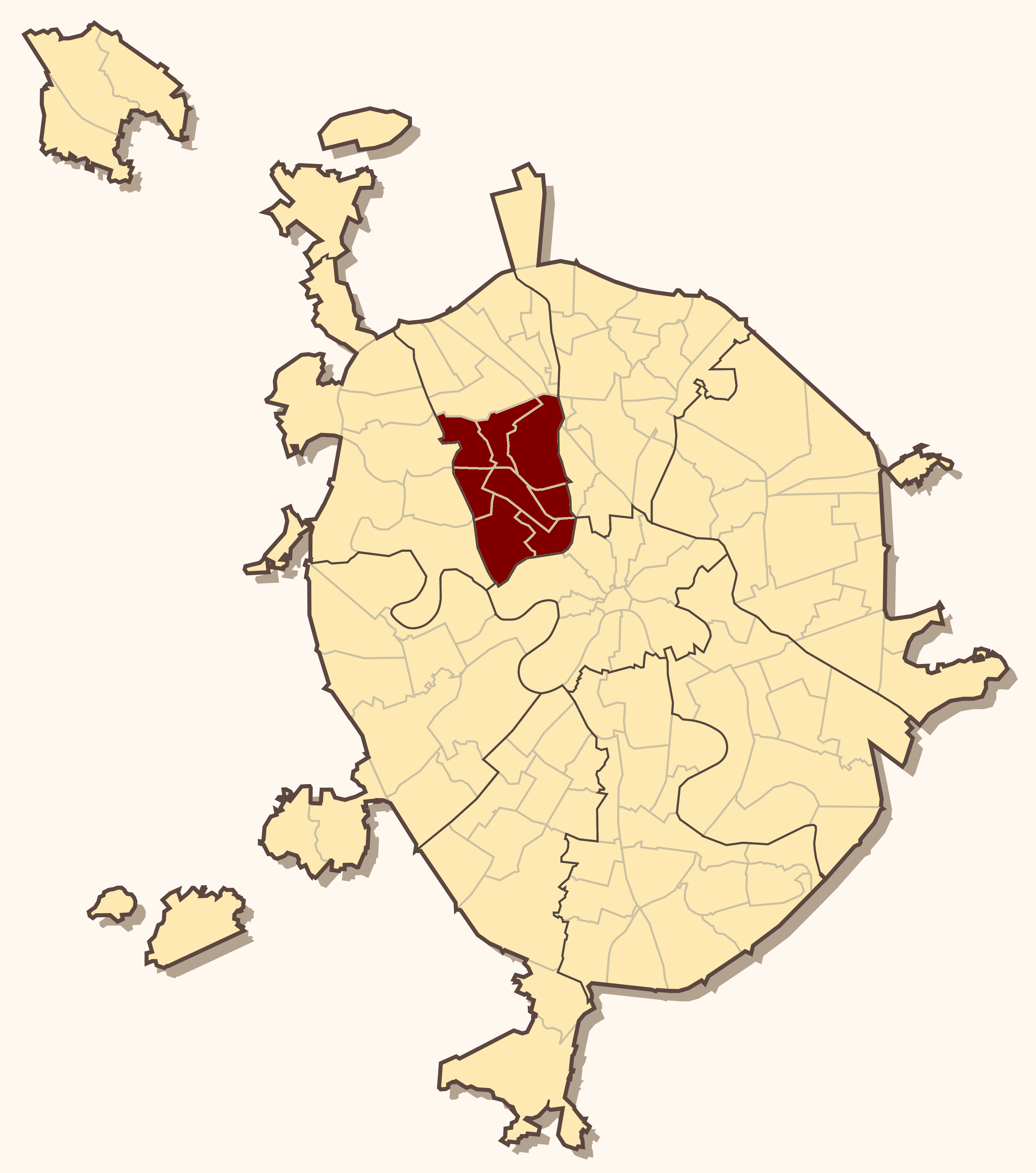 Карта Всехсвятского благочиния Москвы